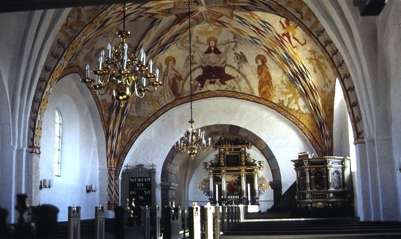 Vinderslev Kirke, Silkeborg Kommune, kirkerummet